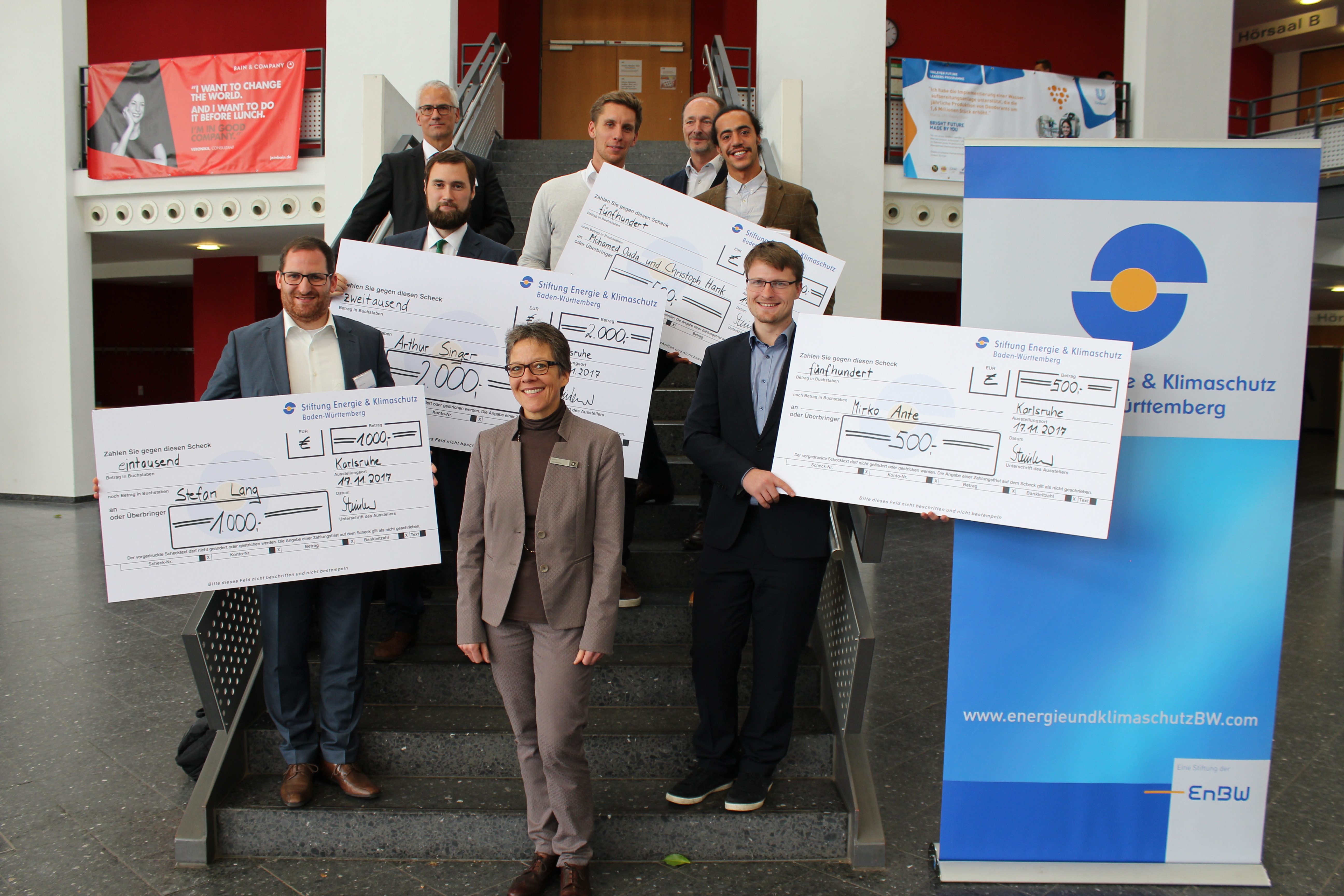 Bild nach Preisverleihung Energie-Campus 2017